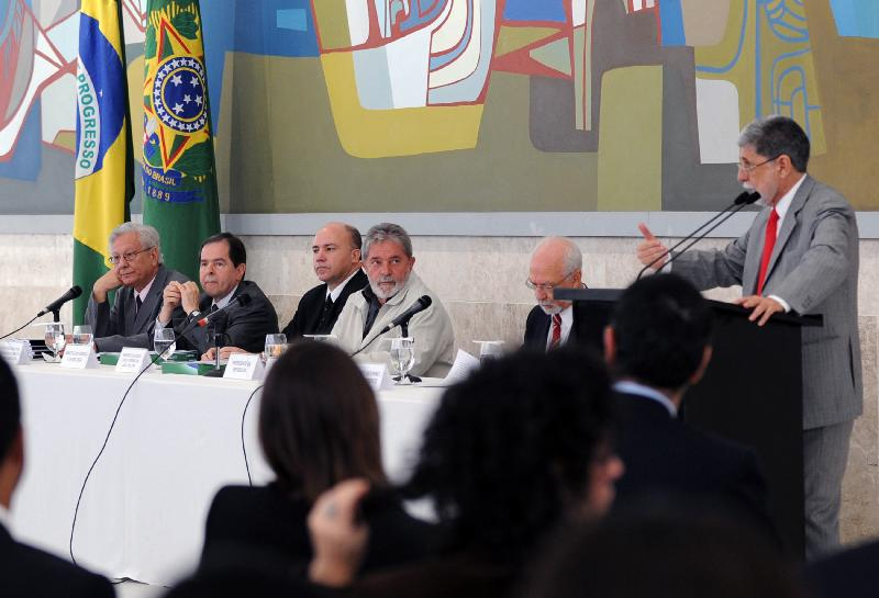 Brasília - O ministro das Relações Exteriores, Celso Amorim, participa da reunião de coordenação anual do Fórum Brasileiro de Mudanças Climáticas.